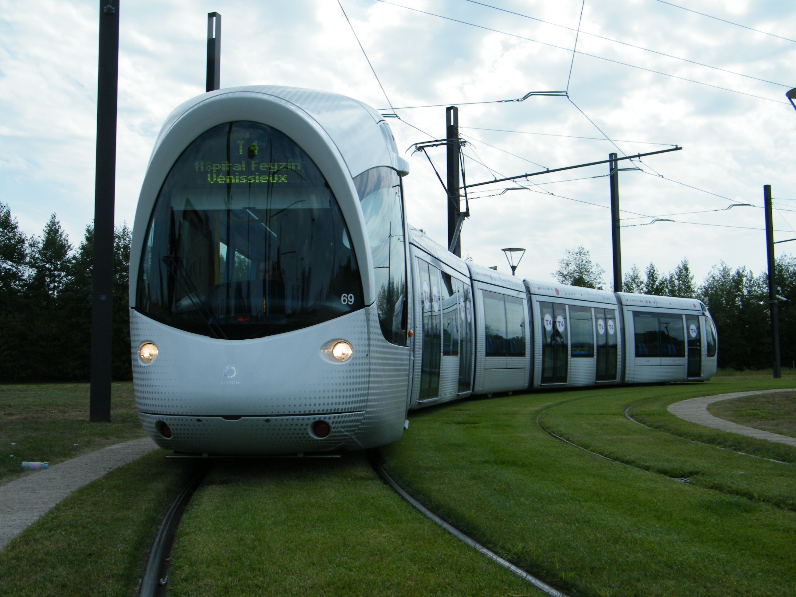 Cette rame de tramway est au tiroir de retournement, au terminus de la ligne T4 TCL, à Feyzin. Elle s'apprête à repartir dans l'autre sens.